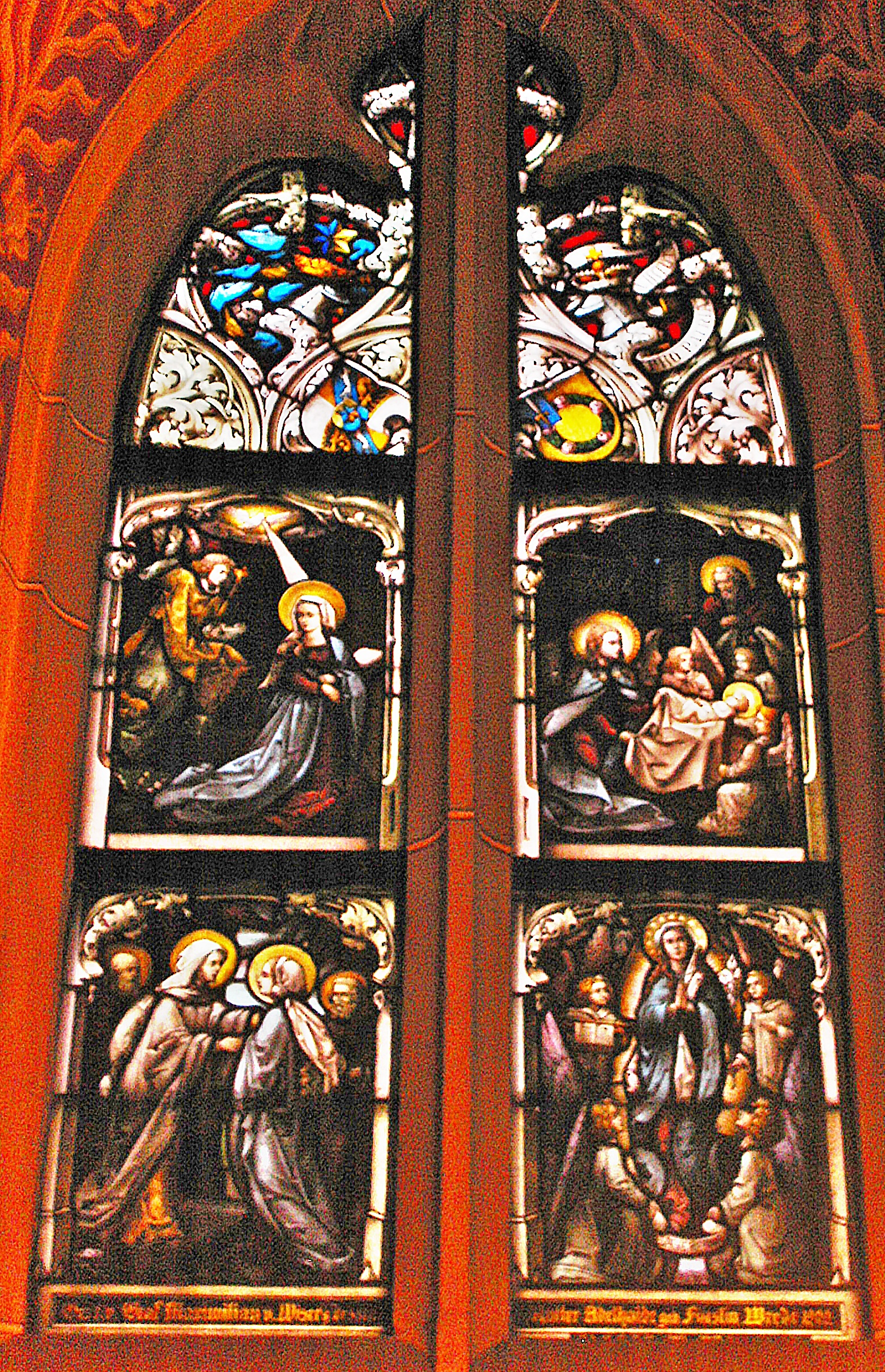 Wallfahrtskirche St. Johannes Baptist Leutershausen (Hirschberg), Fenster der Gnadenkapelle, mit den Stifterwappen der Familien von Wiser und von Wrede.